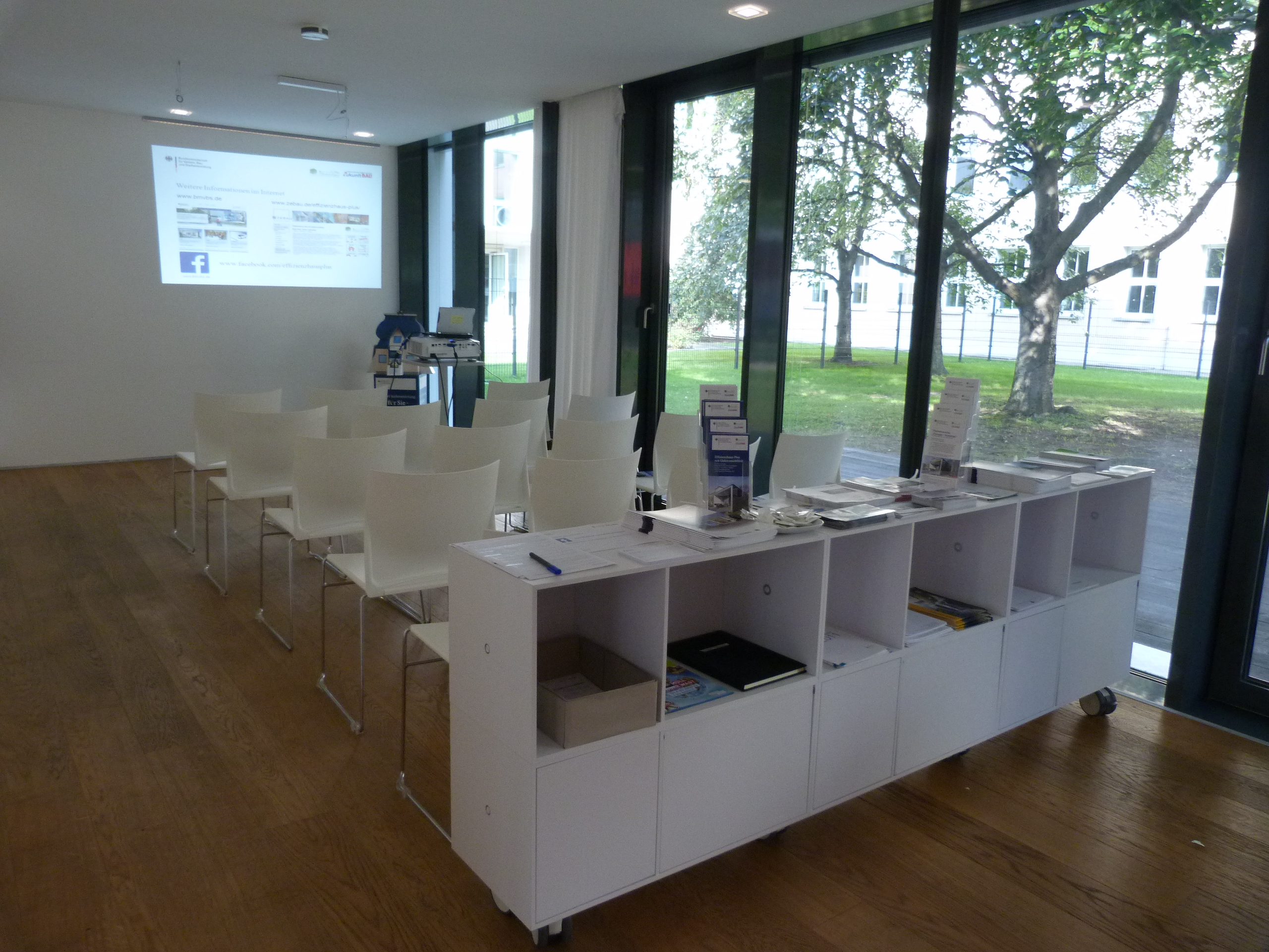 Innenansicht EG